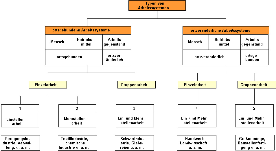 Arbeitssystemtypen nach REFA